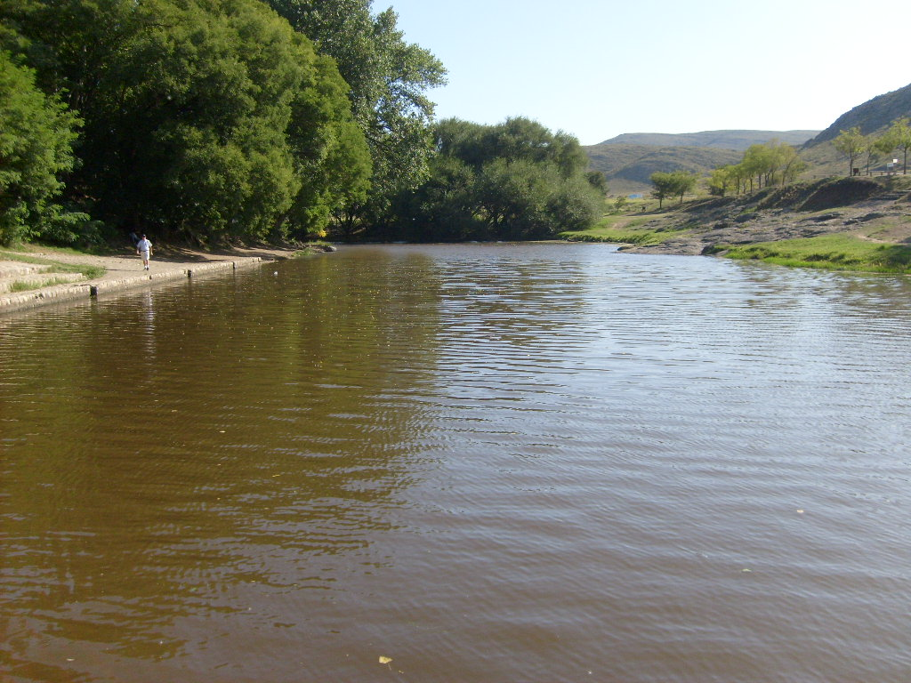 Vista del embalse del río Sauce Grande, al pie del Cerro del Amor en Sierra de la Ventana, febrero de 2009.